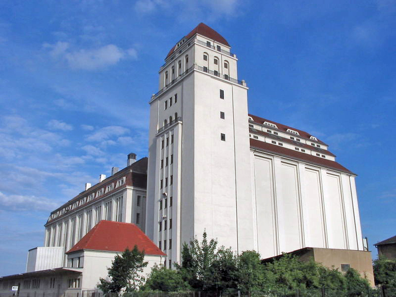 Mühle Dresden („Bienerts Hafenmühle“), am altstädter Hafen in Dresden